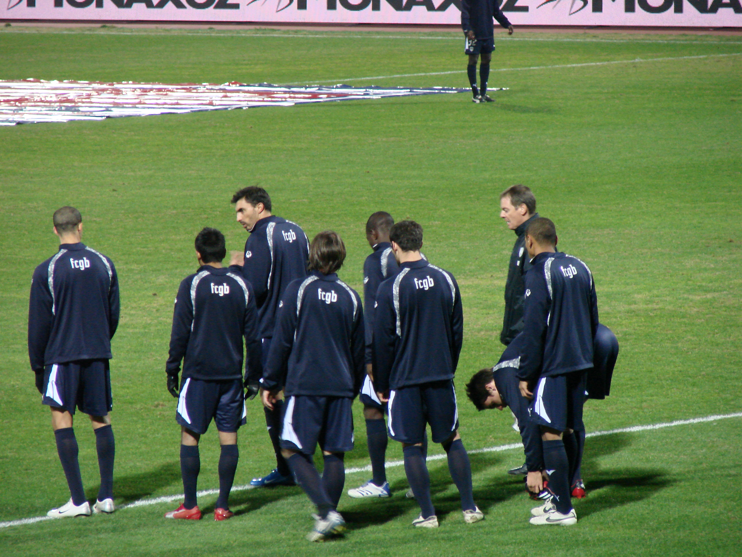 David Jemmali, de profil, le 3ème à partir de la gauche